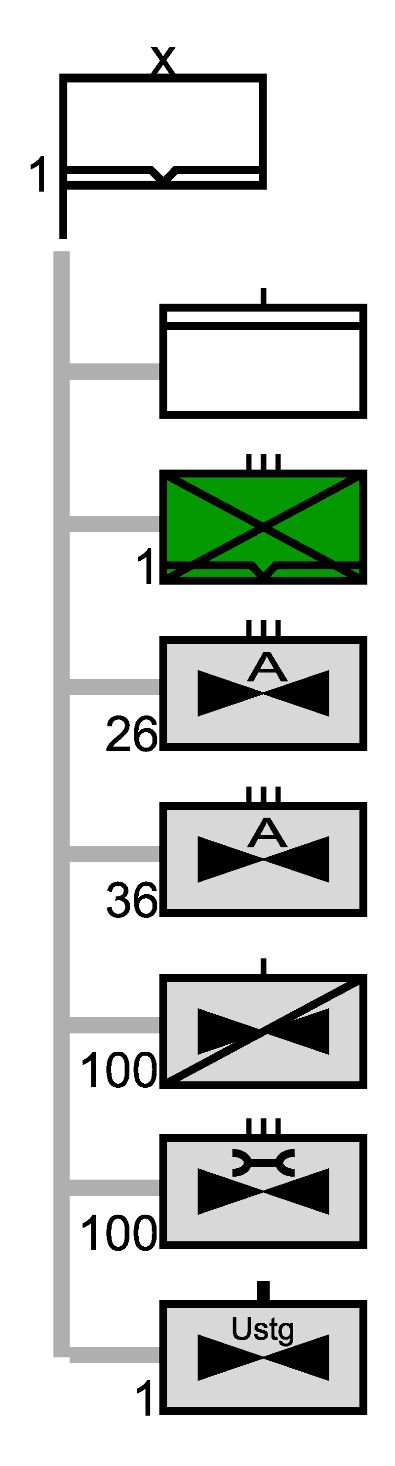 Gliederung Luftbewegliche Brigade 1 im deutschen Heeres.